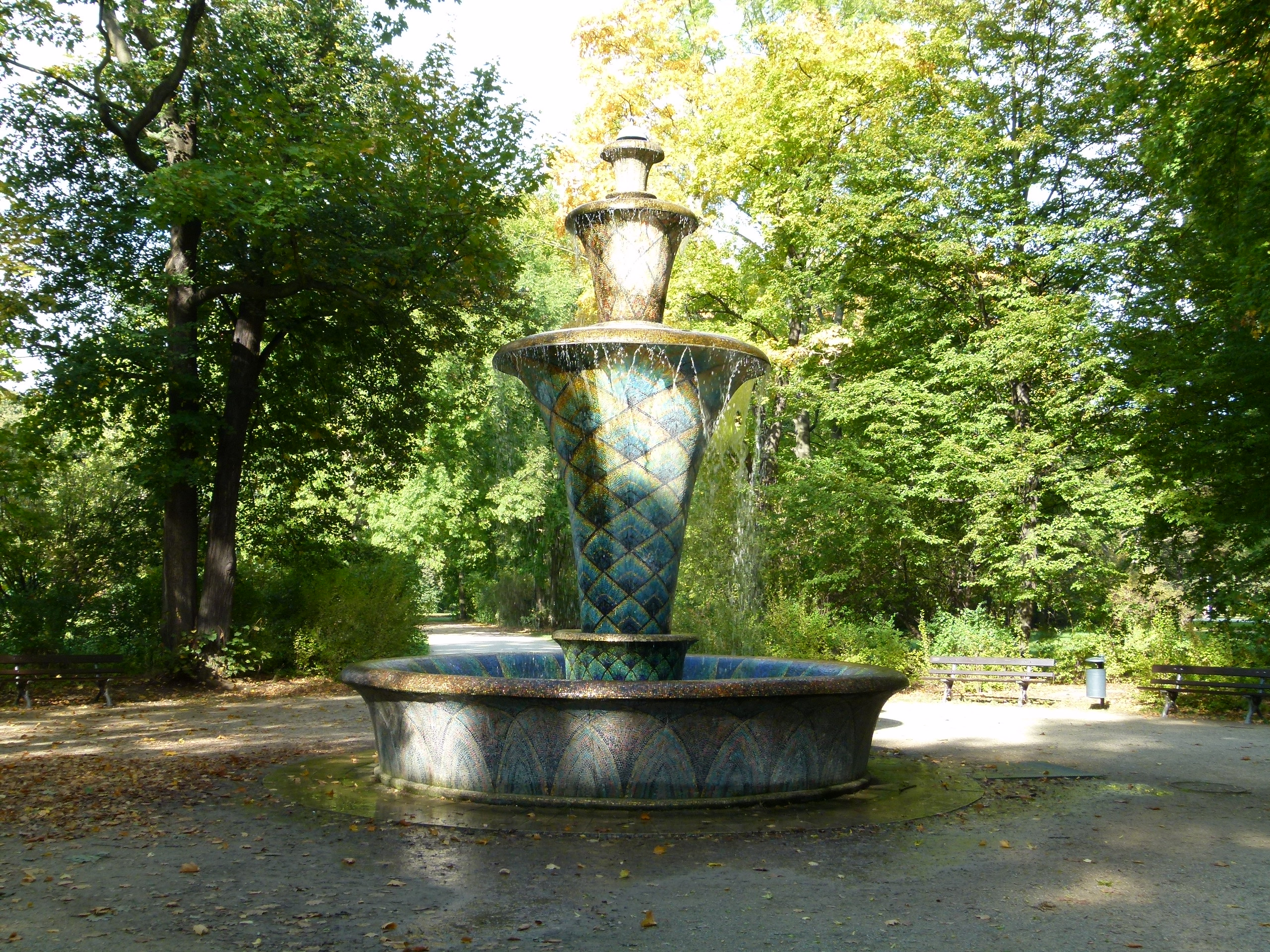 Denkmalgeschützter Mosaikbrunnen im Großen Garten, Dresden